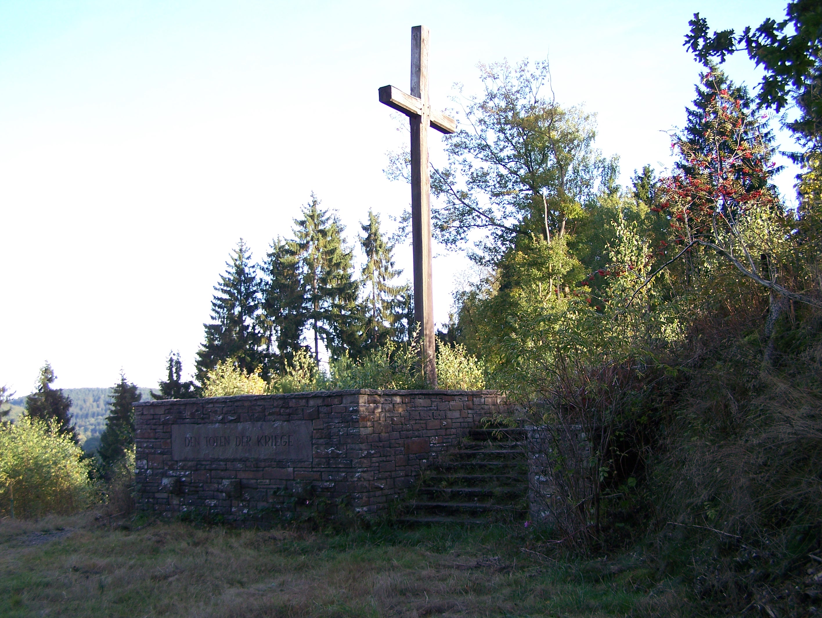 Gedenkstätte am Knockelsberg